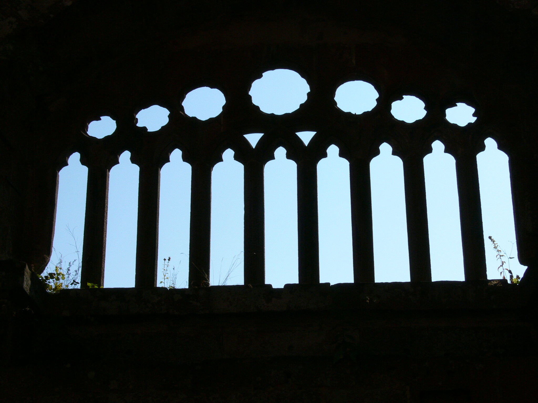 Fenêtre à 9 lancettes et 7 occuli restaurée en 1909.